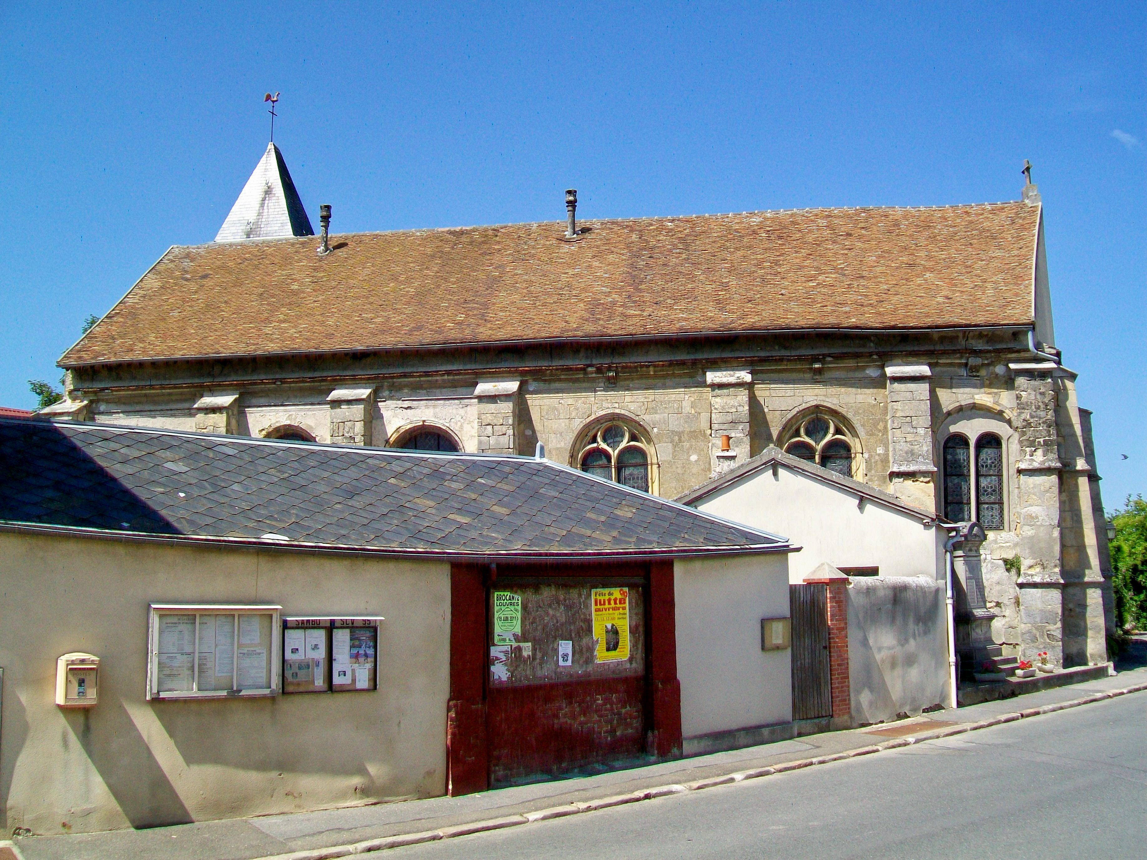 La façade sud de l'église Saint-Thomas-de-Cantorbéry est celle qui est le mieux conservée ; elle donne cependant sur un jardin et l'on ne peut s'en approcher. La largeur inégale des travées surprend.